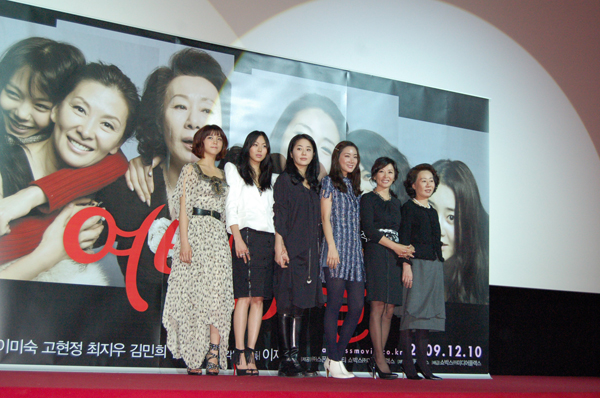 영화 여배우들